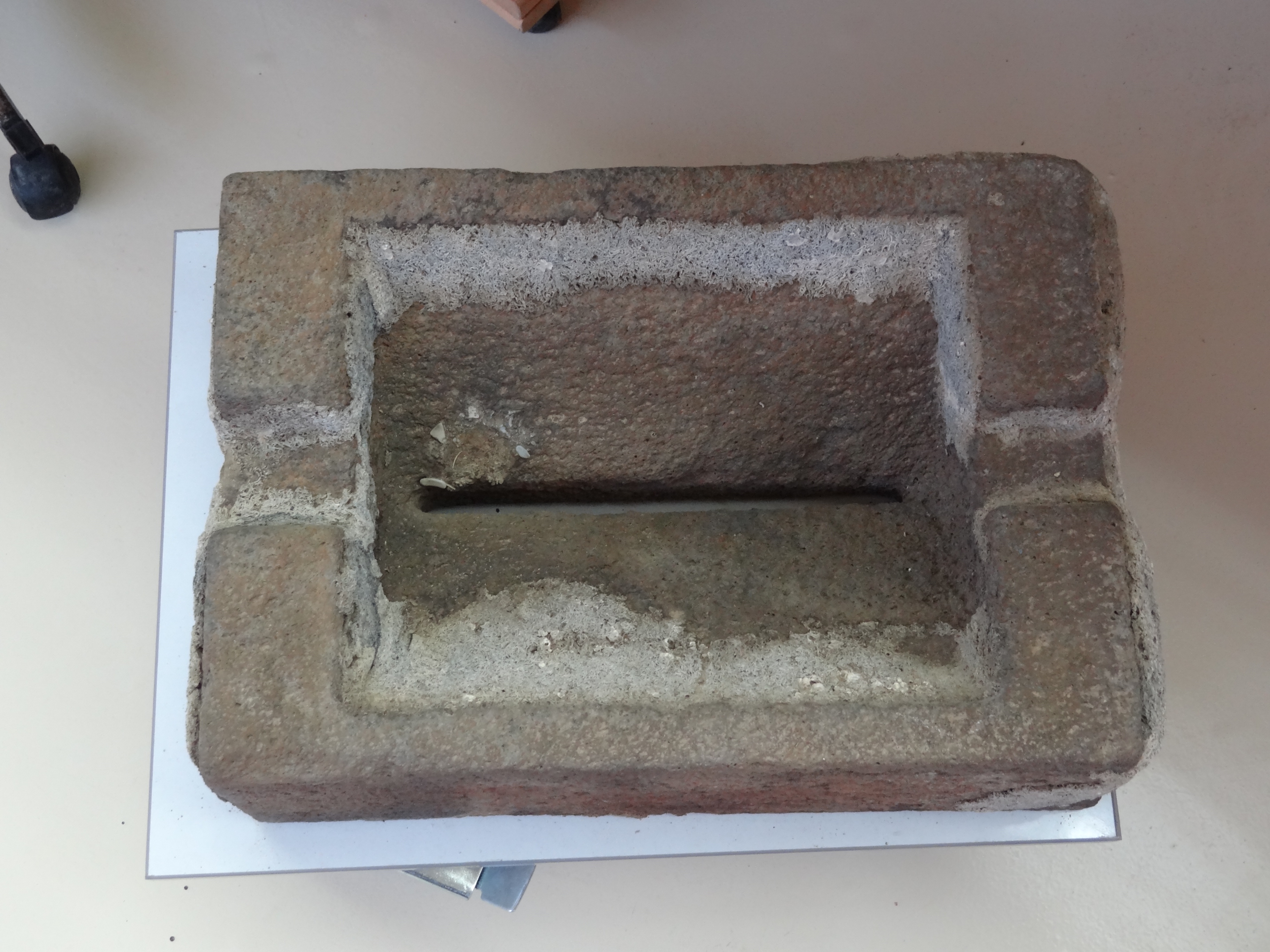 Archaeological Museum Beit Miriam in kibutz Palmahim, Israel מוזיאון בית מרים - הים ומלואו" הוא מוזיאון לארכאולוגיה השוכן בקיבוץ פלמחים מעל מצוק הצופה לים. המוזיאון מתרכז בממצאים ארכאולוגים שנחפרו באזור הקרוב לפלמחים, בחלקו התחתון של ערוץ נחל שורק וממצאים שנמשו מהים בקרבת הקיבוץ. אבן רכב של רחיים של דחף - עשויים מבזלת מיבנה ים.